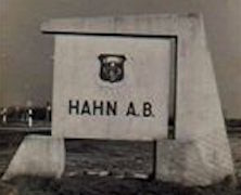 Schild